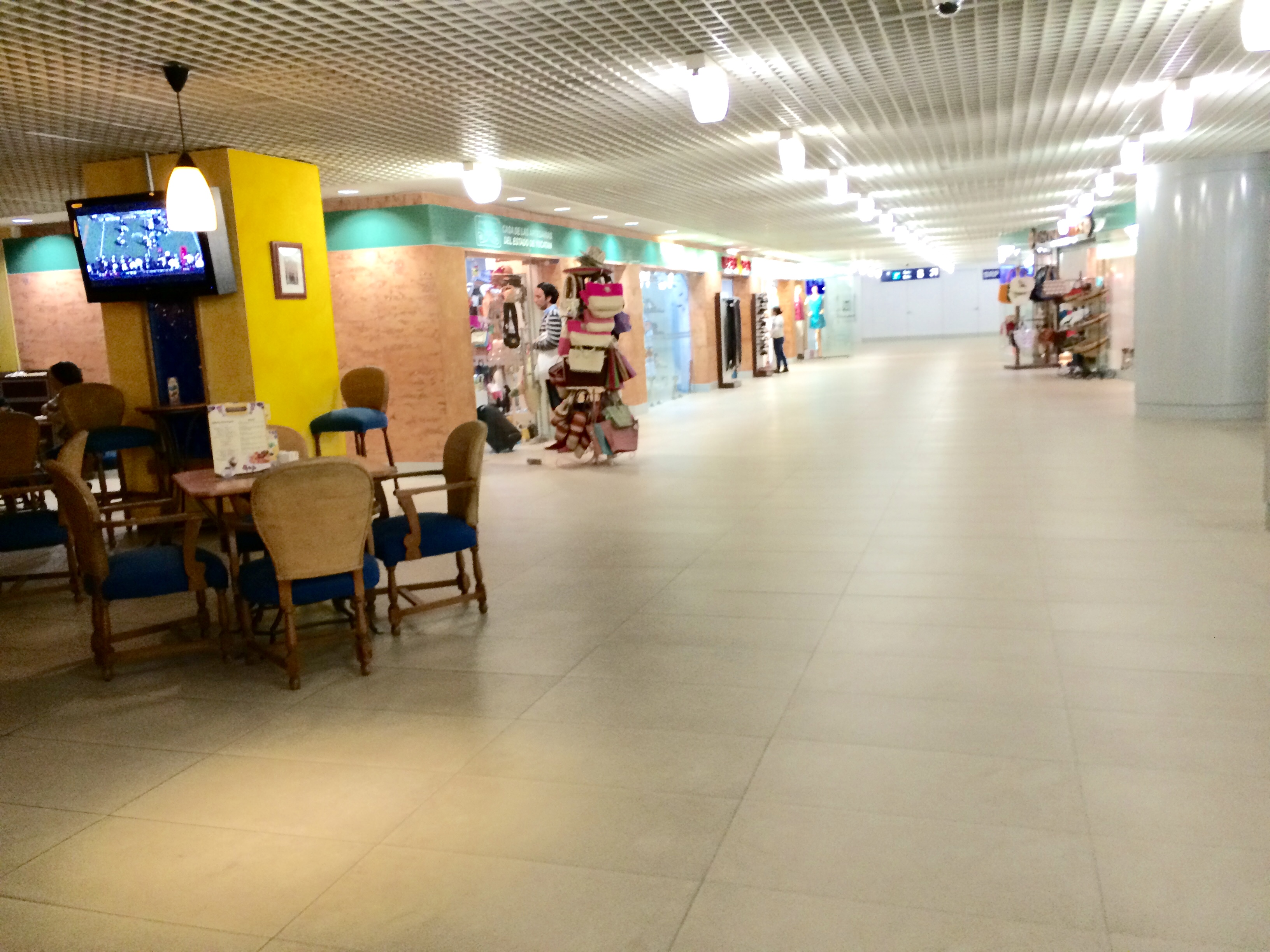 Pasillo principal del Aeropuerto de Mérida.